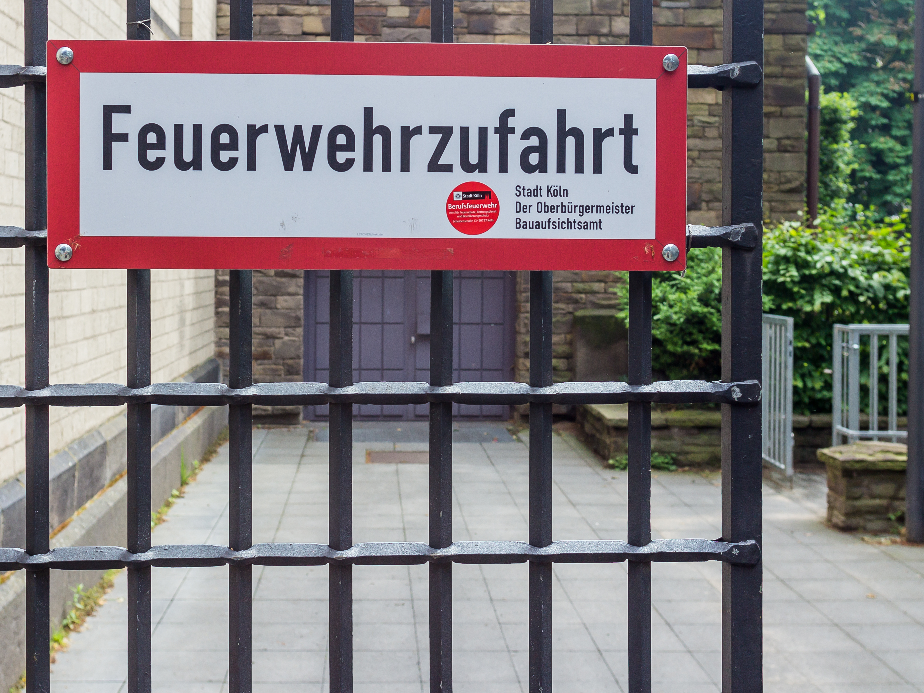 Amtlich gekennzeichnete Feuerwehrzufahrt, Pastor-Könn-Platz, Köln. Westlich von St. Aposteln vor der Joseph-Könn-Aula